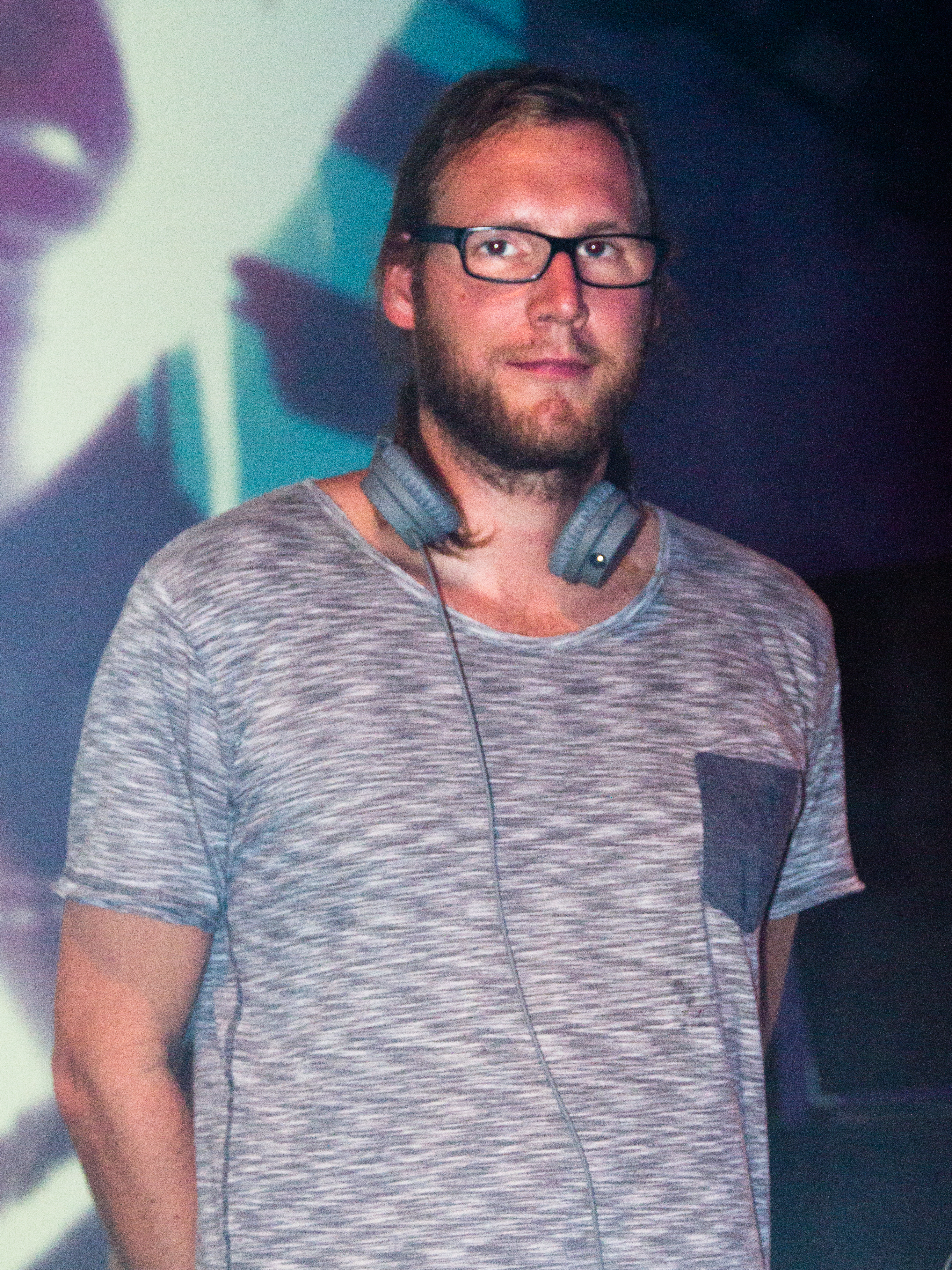 Oliver Schories beim 14. Airbeat-One Dance Festivals das vom 16. bis 19. Juli 2015 auf dem Flugplatz Neustadt-Glewe stattfand.